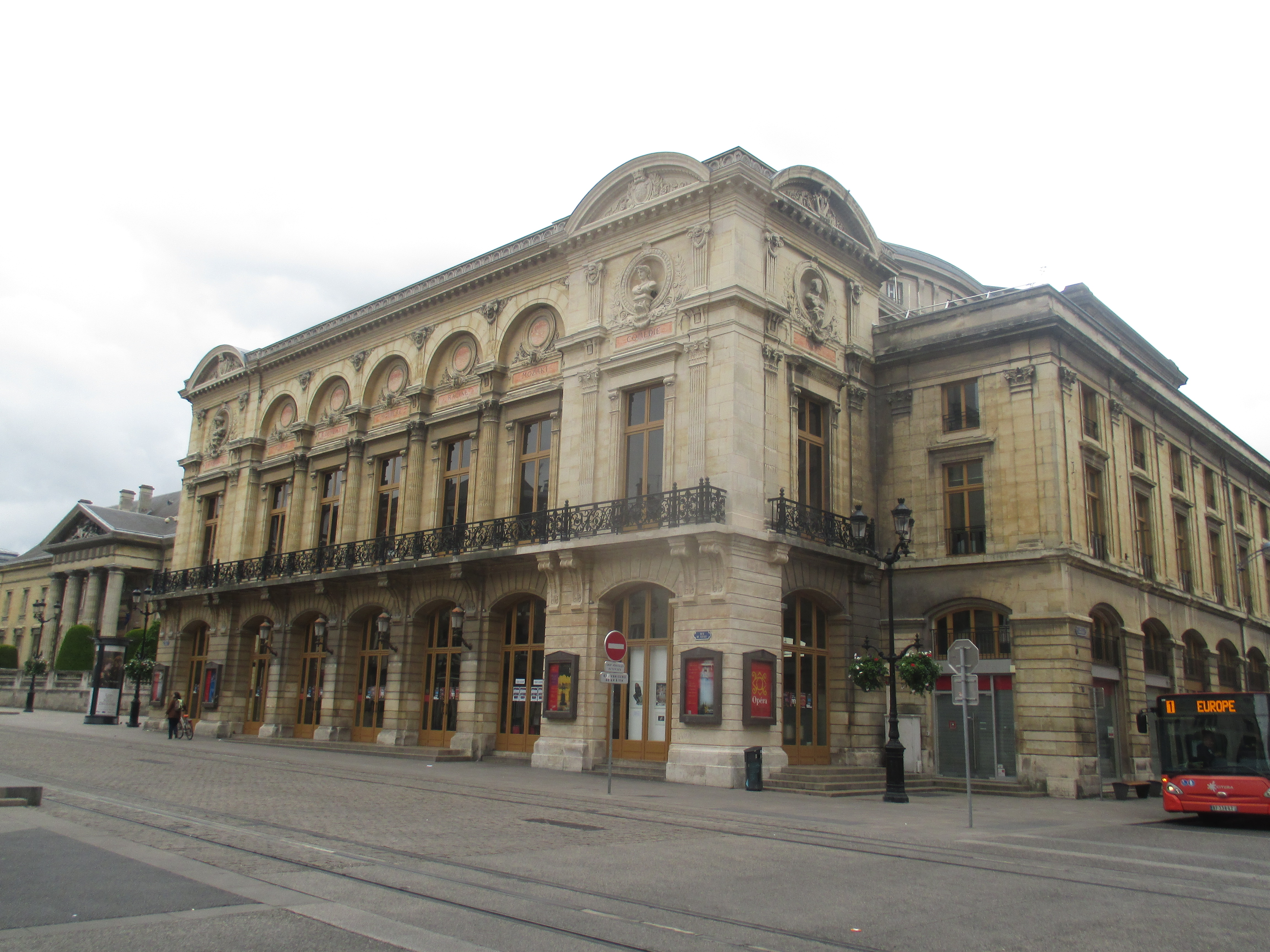 Opéra de Reims, rue de Chanzy.